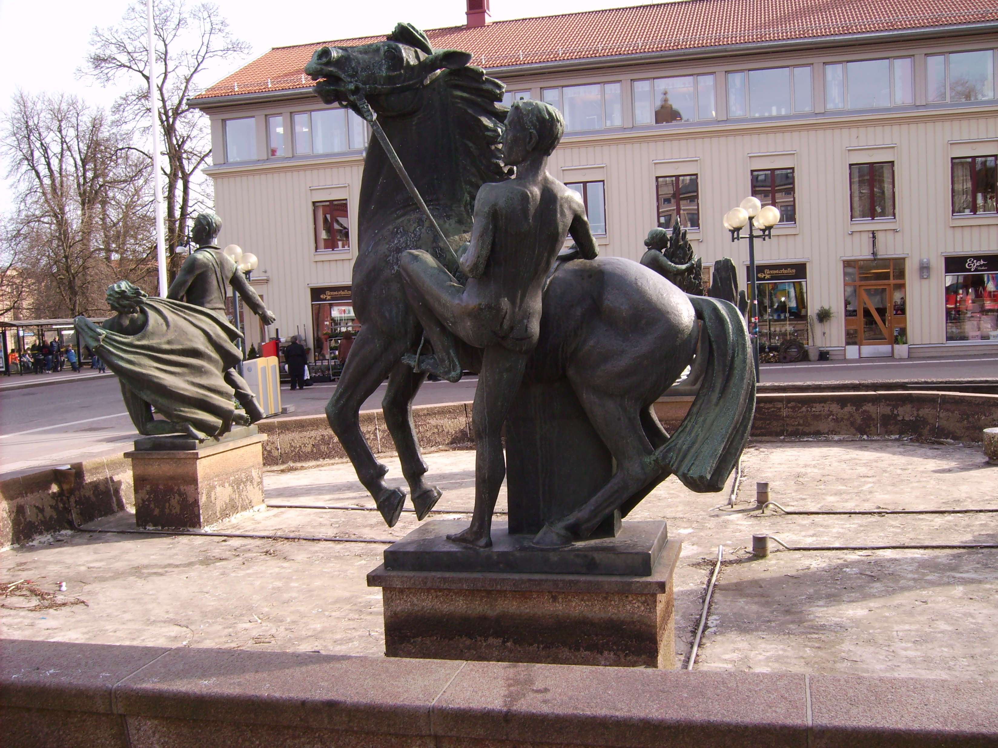 Bilden är fotograferad av Harri Blomberg. Photo by Harri Blomberg.